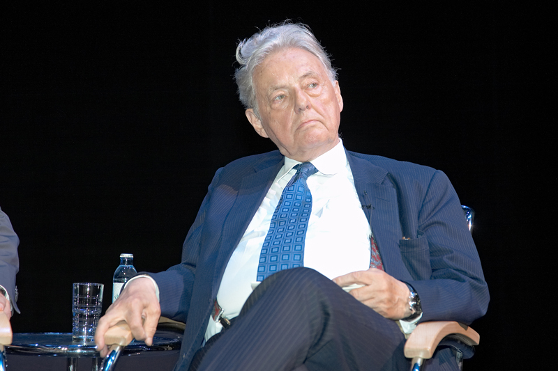 Literarisches Gipfeltreffen: Gruppe 47 – sechzig Jahre danach Günter Grass, Joachim Kaiser und Martin Walser im Gespräch mit Wolfgang Herles 15. Juni 2007, 20 Uhr auf dem Blauen Sofa im Berliner Ensemble